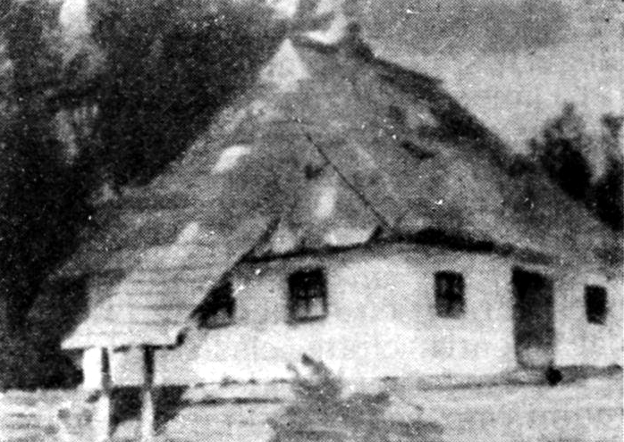 Casa părintelui Vasile Lucaciu din Șisești - Satu Mare.